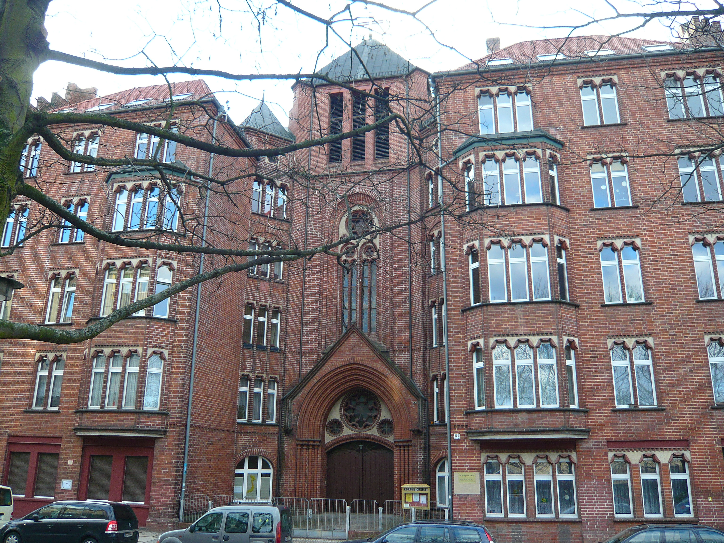 Kath. Kirche S. Corpus Christi, Prenzlauer Berg, Conrad-Blenkle-Straße